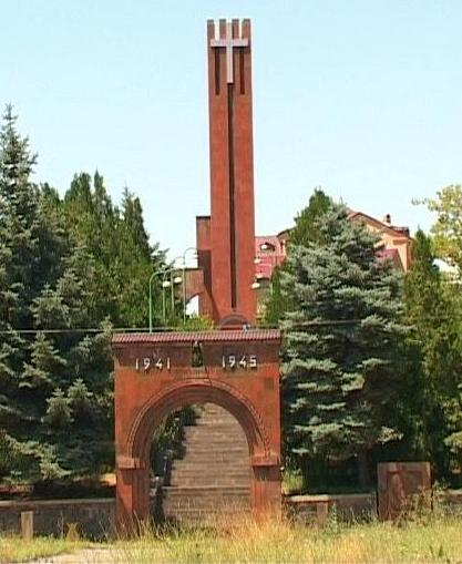 Զովունի գյուղի հուշարձան համալիր